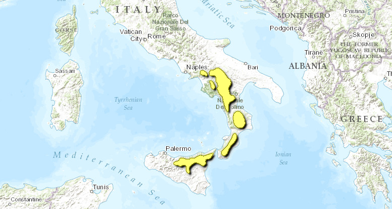 Mappa Ecoregione PA1218 - Foreste montane miste dell'Appennino meridionale